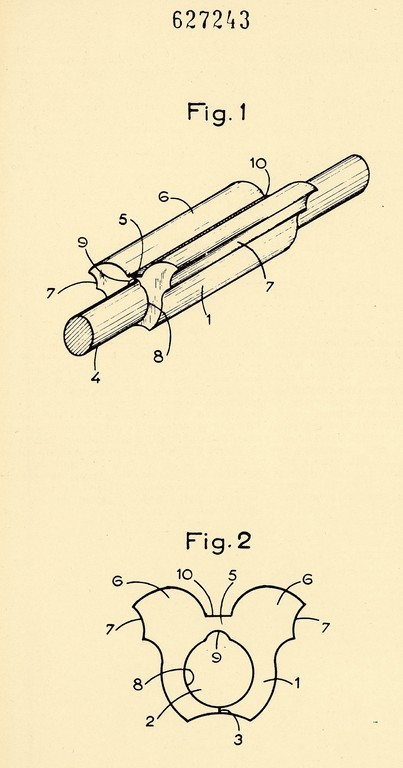 Disegno per il brevetto per invenzione industriale n. 627243, classe A 45 d, della società Perma sa per un manicotto riscaldante per bigodini, Parigi. Priorità: Francia, domanda di brevetto n. 814508 del 30 dicembre 1959. Data di deposito: 5 marzo 1960. Data di concessione: 28 ottobre 1961 (AS Genova, Ufficio provinciale industria, commercio e artigianato di Genova, Fondo Brevetti)